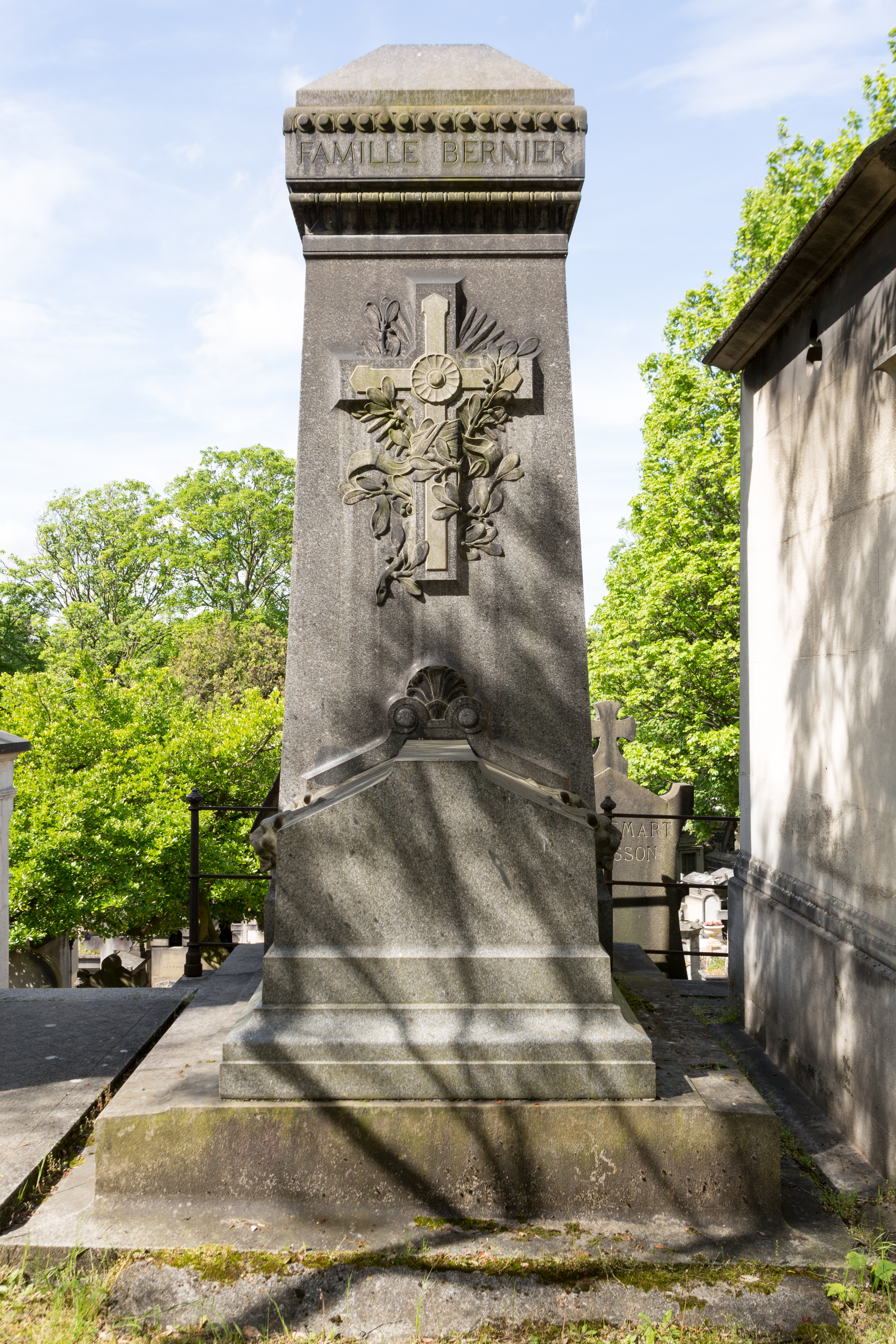 Sépulture de Stanislas-Louis Bernier (1845-1919), architecte, premier grand prix de Rome en 1872.